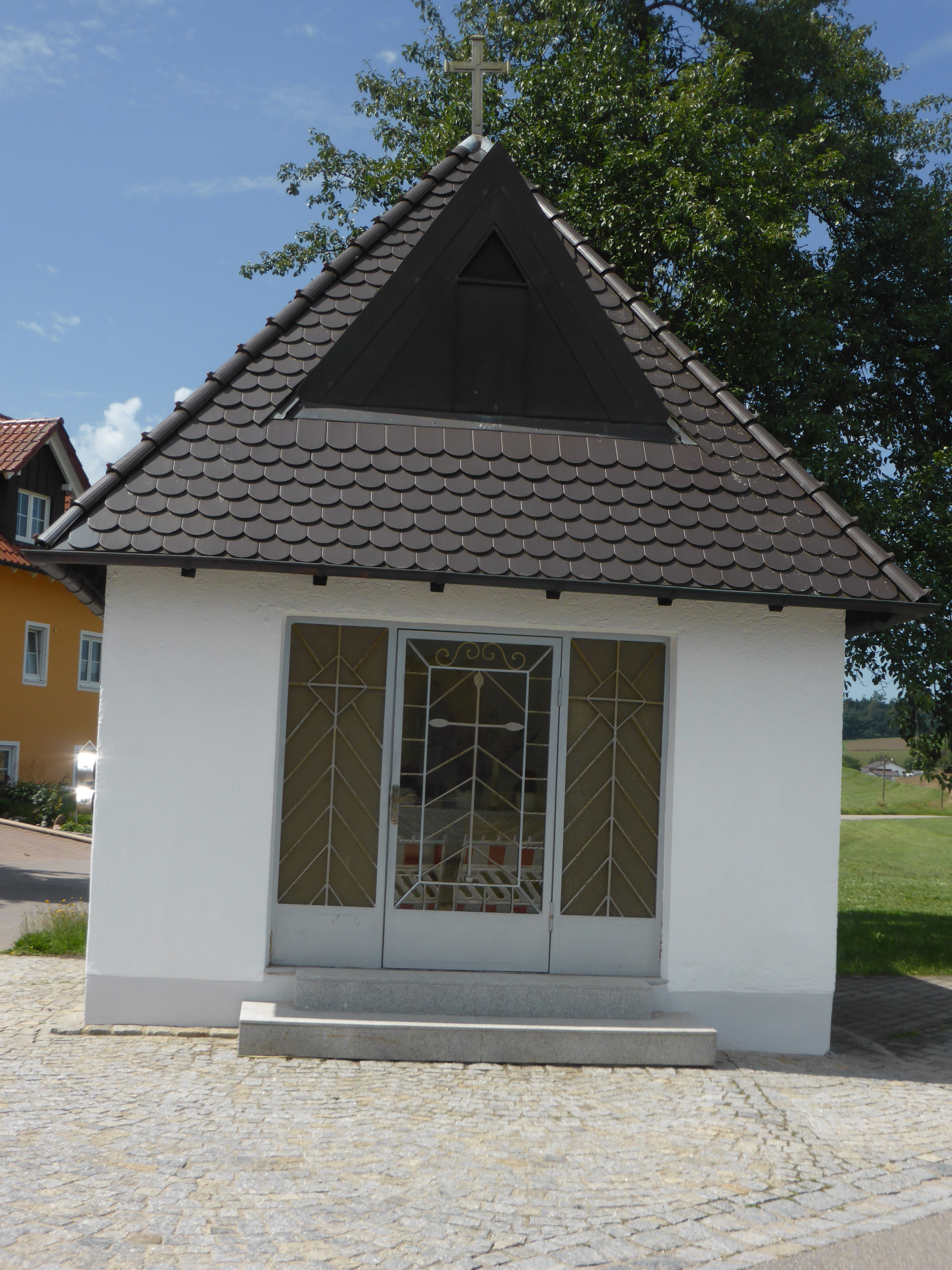 Dorfkapelle in Loch bei Regenstauf, die Kapelle wurde 1966 an der Stelle der um 1870 errichteten alten Dorfkapelle errichtet